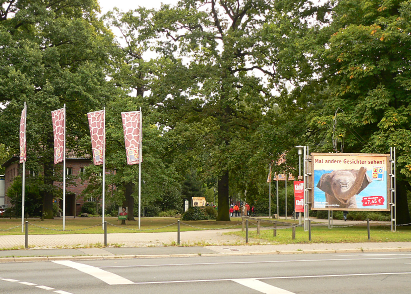 Eingang Zoo Hannover